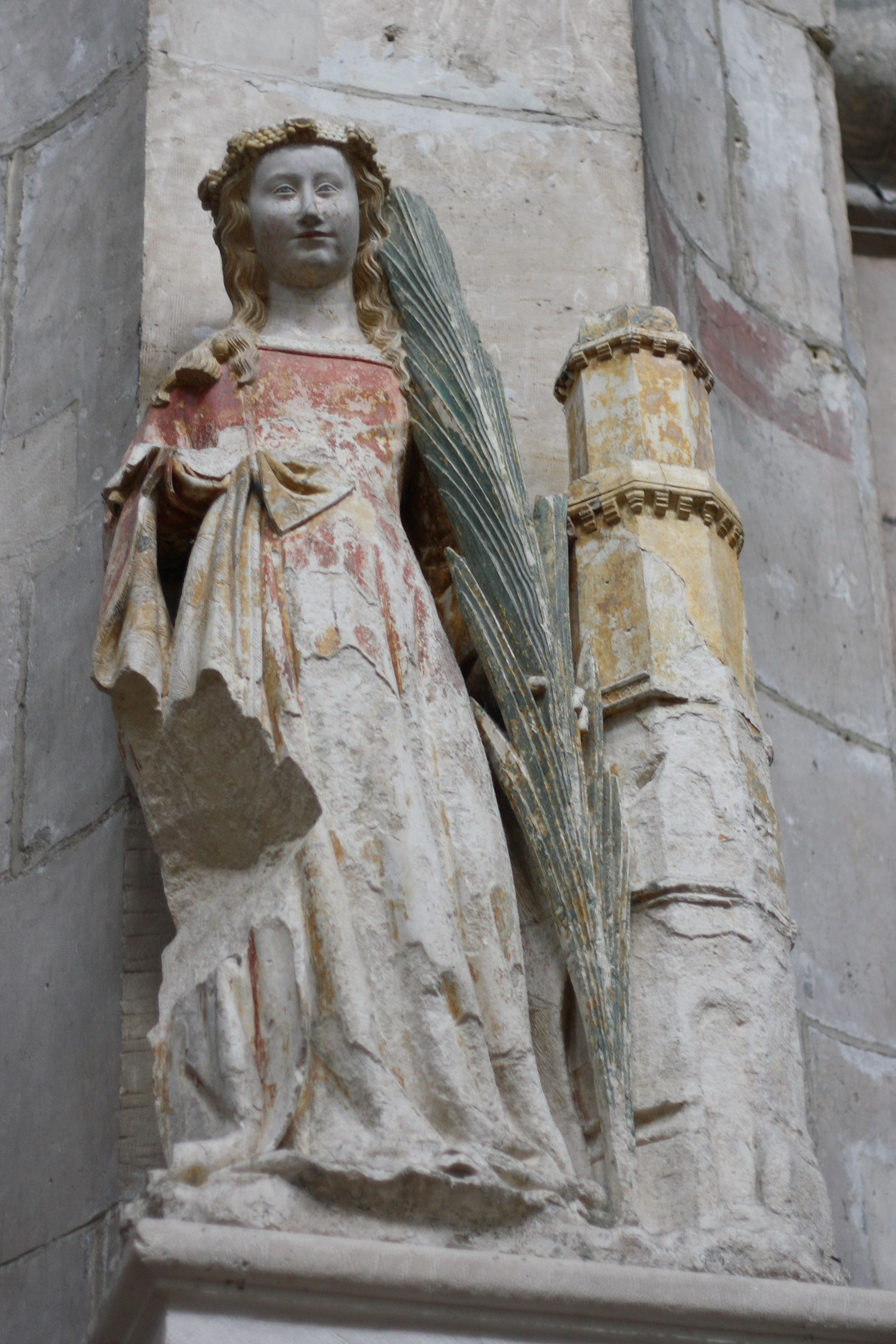 katholische Pfarrkirche Notre-Dame in Poissy, Statue der hl. Barbara (14. Jahrhunderts)